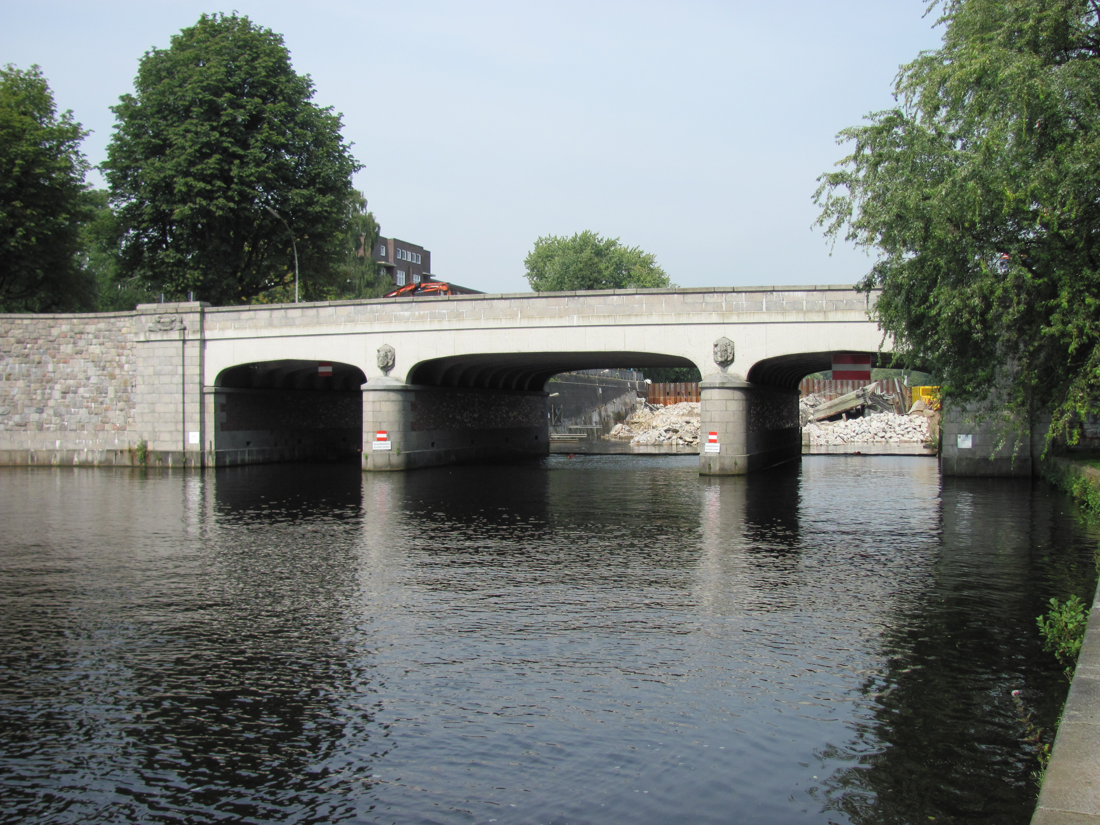 Hasenbergbrücke in Hamburg